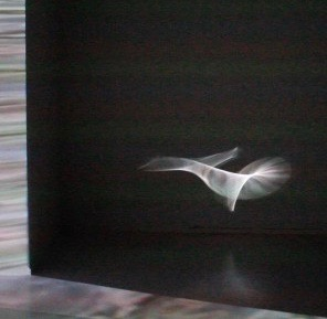 Skyggespill Filmatiske distraksjoner 2016 Scenisk-liveutstilling Foto: Silje Steinsvik